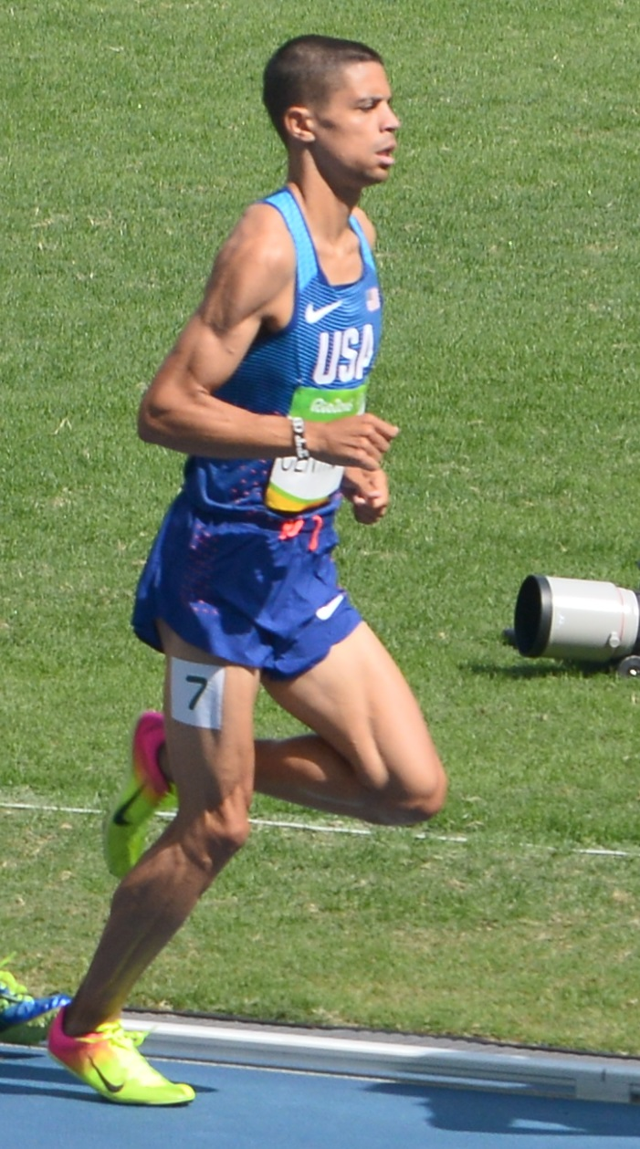 Matthew Centrowitz dans sa série du 1500m des jeux olympique de Rio 2016